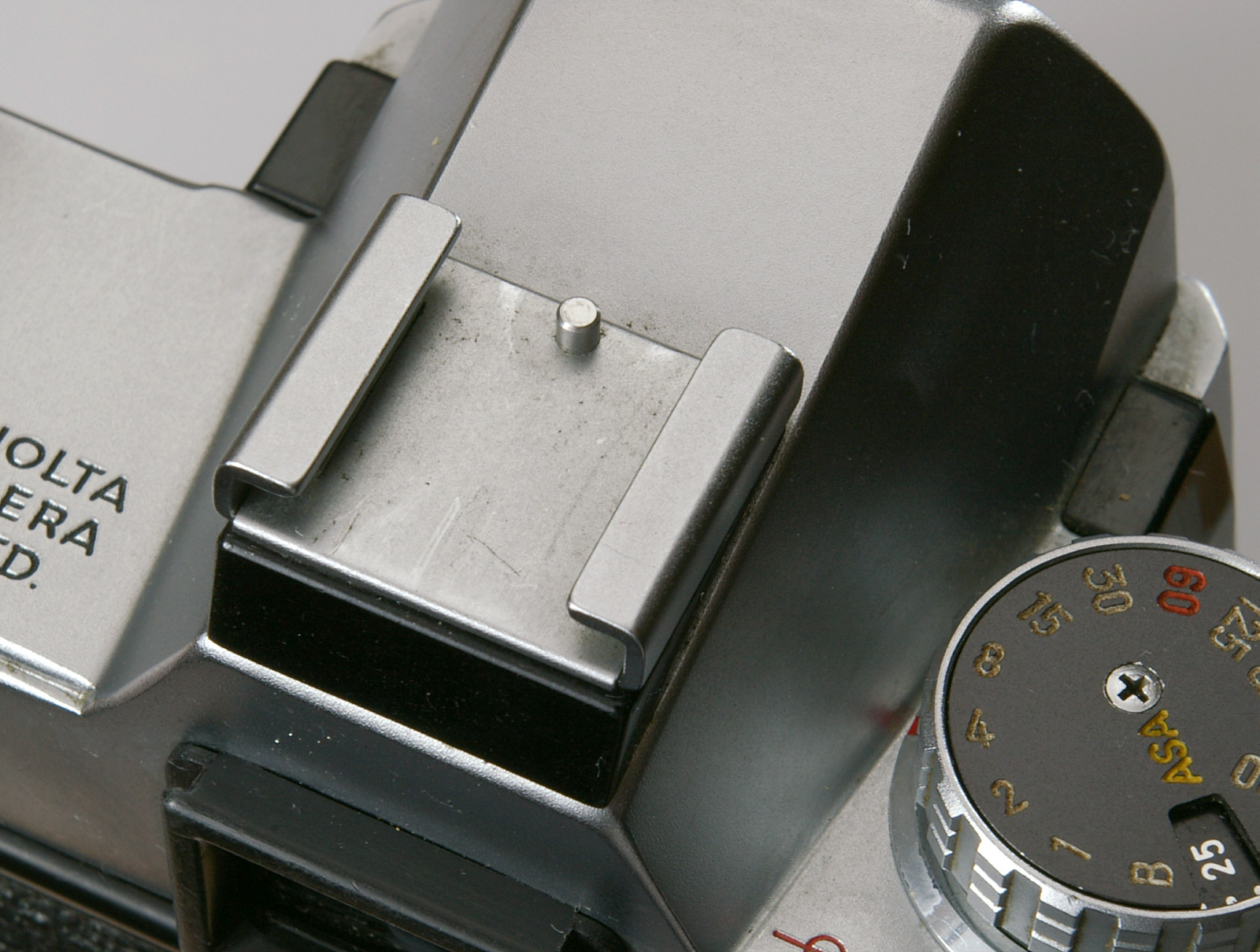 Zubehörschuh der ersten Baureihe der Minolta SRT 101 noch ohne Mittenkontakt